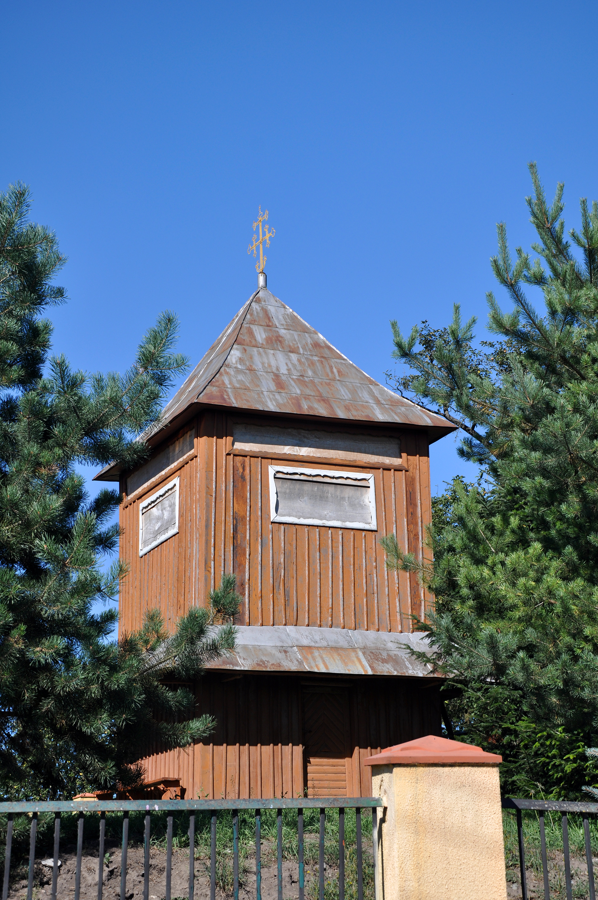 Дзвіниця церкви Св. Миколая (дер.), с. Помонята